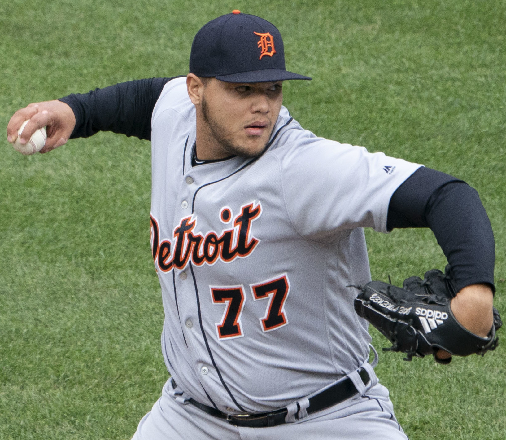 Tigers at Orioles 4/29/18